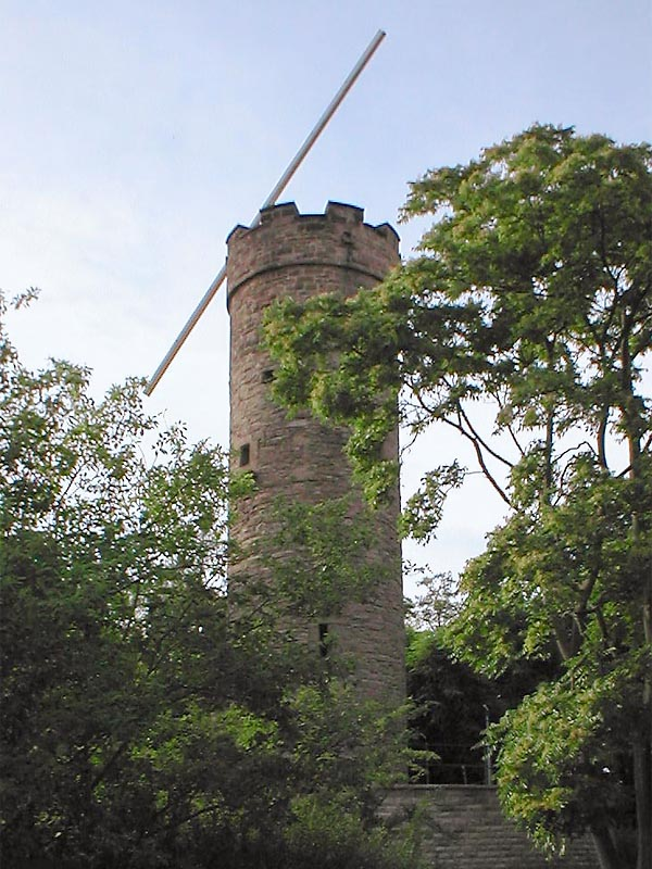 Lichtskulptur "Sonnenstrahl für Heilbronn" (Jan van Munster) auf dem Wartbergturm Heilbronn